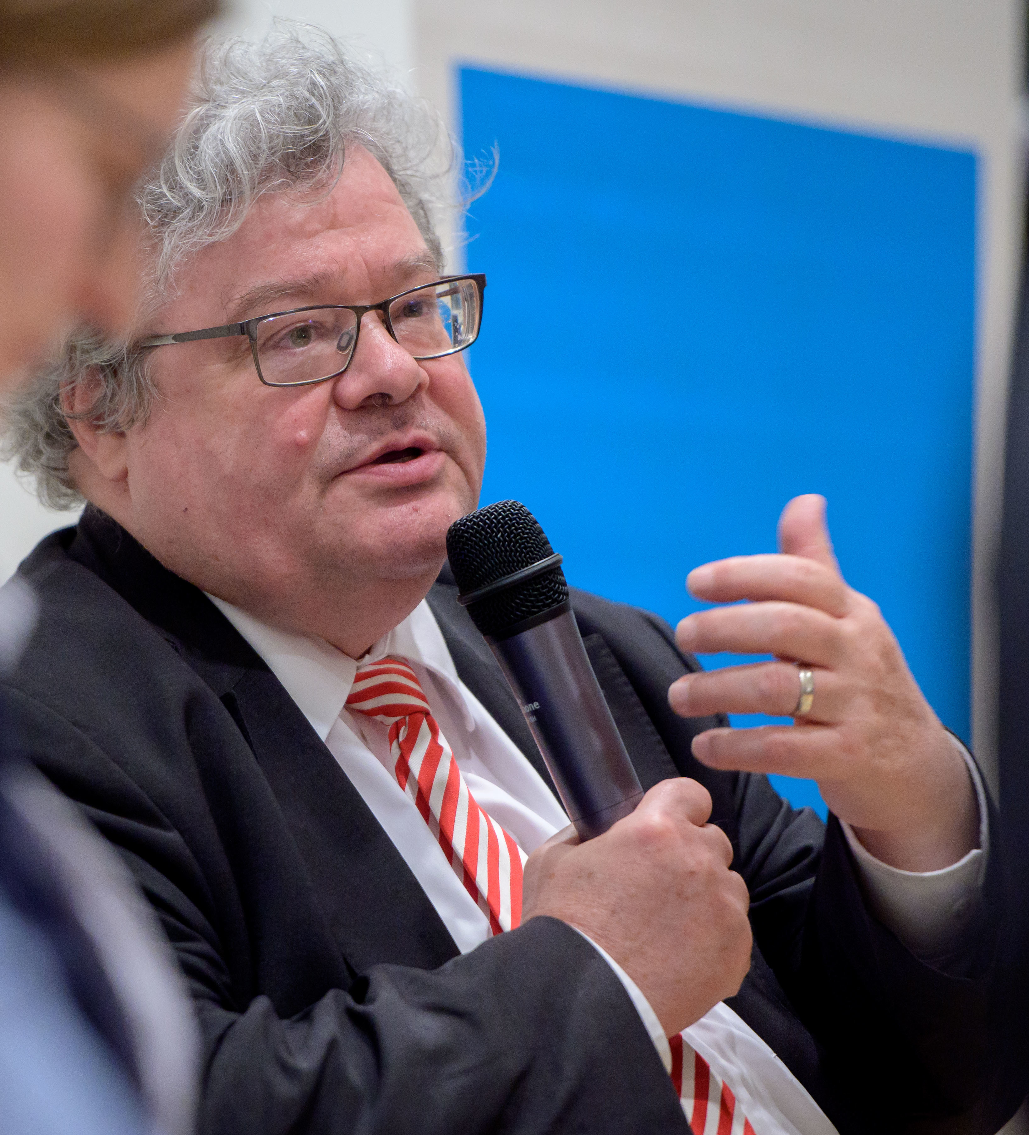 Heinrich-Böll-Stiftung: Auf dem Weg zu einer EU-Energieunion: Das Beispiel der EU-Gasrichtlinie (14. März 2019) Reinhard Bütikofer (MdEP, Vors. Europäische Grüne Partei) Foto: Bodo Gierga